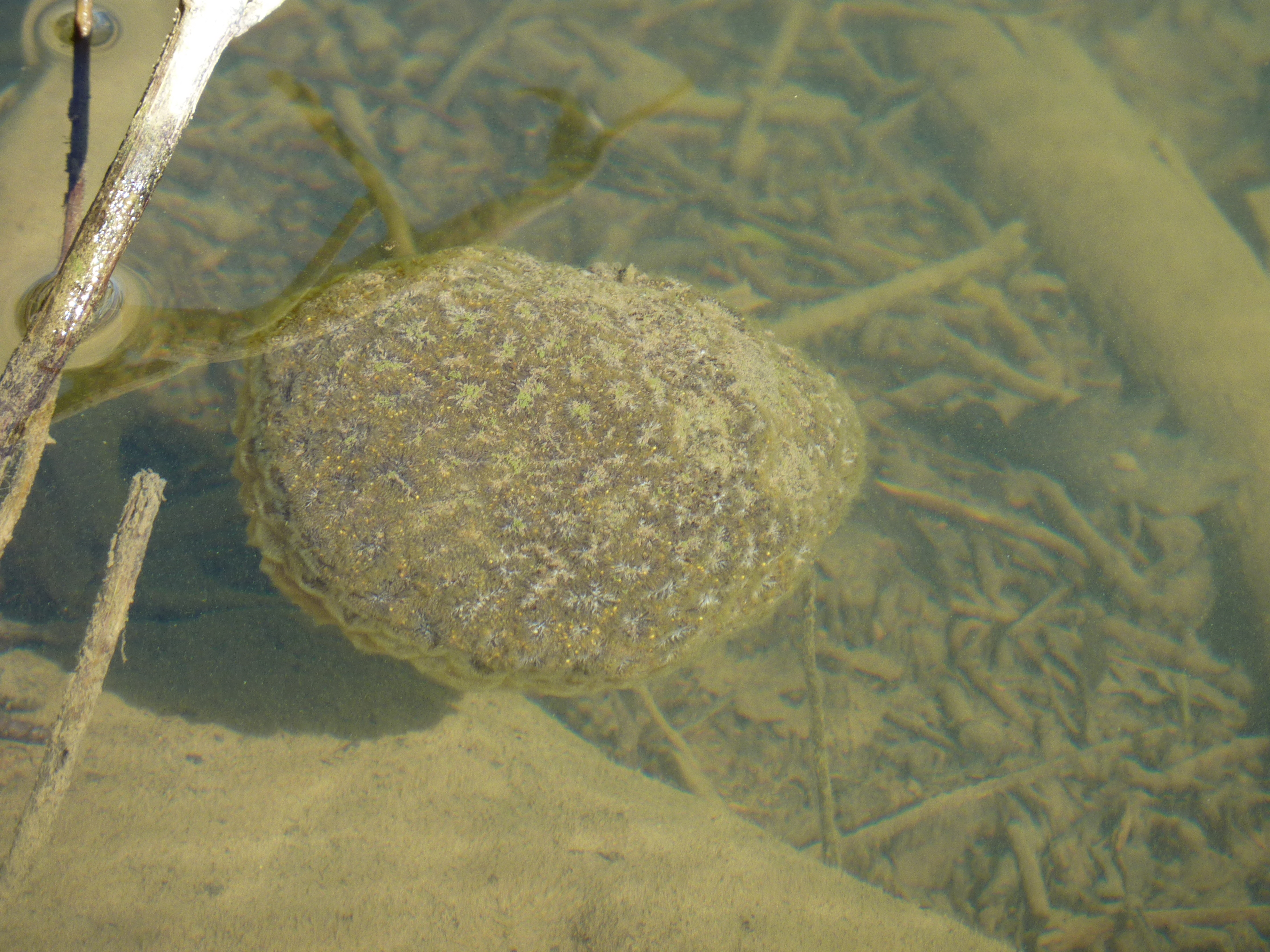 Sujet: Colony of Pectinatella magnifica, reservoir of Esch-sur-Sûre (Luxembourg), 2012-09-08, near Burfelt (Insenborn), water turbid (due to cyanophyte bloom). Auteur: jamcelsus Source: own work Lizenz